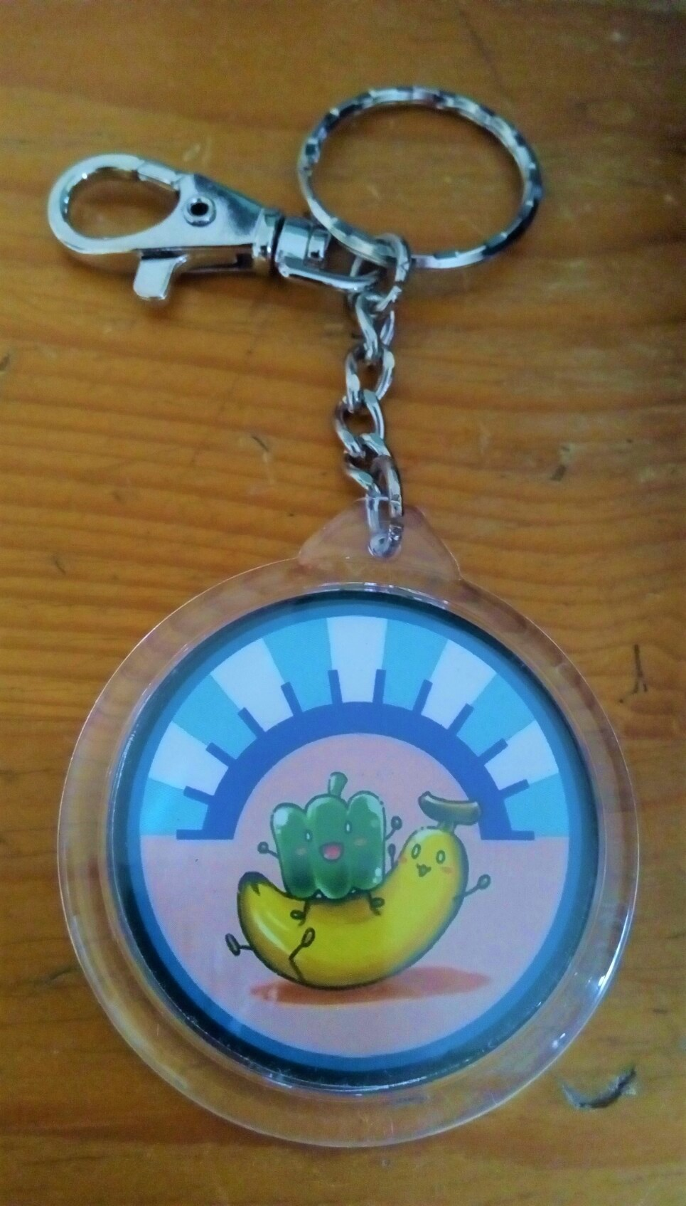 高雄高工贈送畢業生的吊飾（2014）